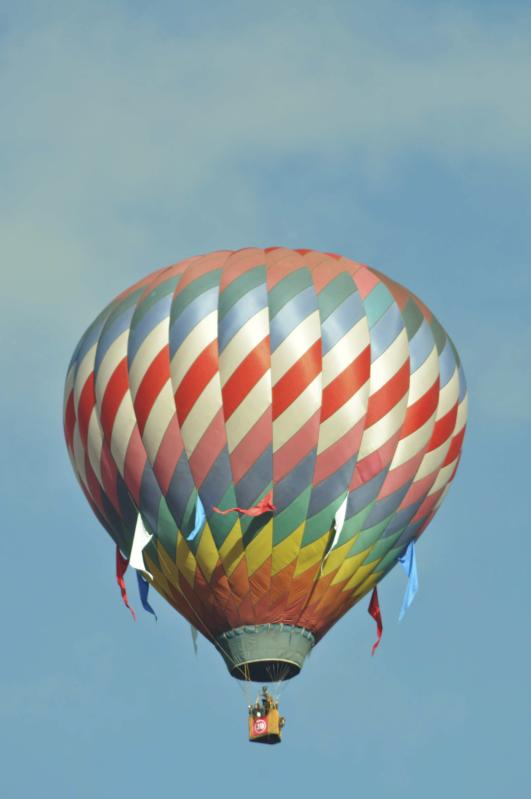 Globo aerostático en Bogotá, como parte de las celebraciones del Bicentenario de Colombia.